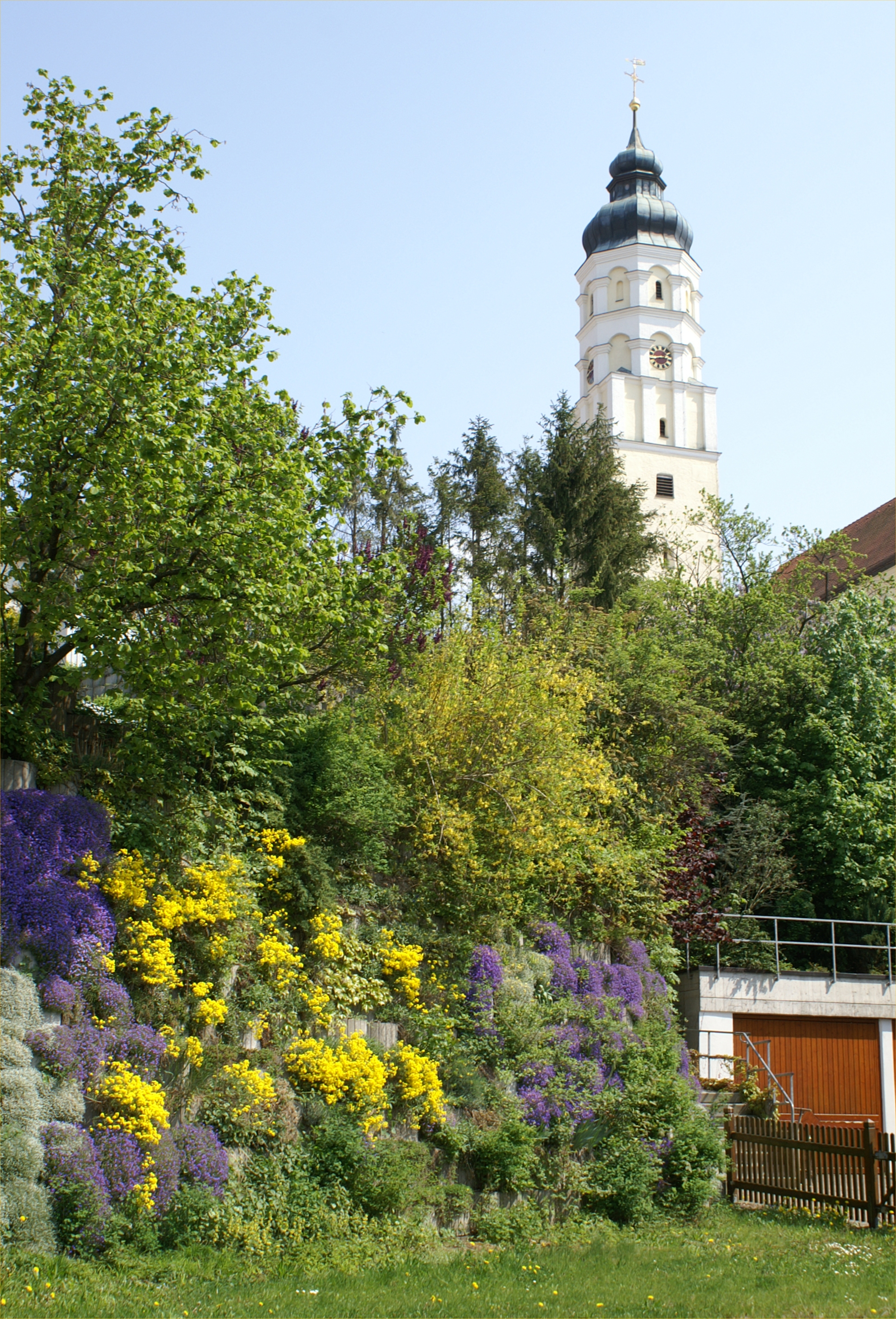 Die Pfarrkirche Sankt Martin in Öpfingen im Alb-Donau-Kreis wurde bereits 1275 erstmals urkundlich erwähnt.